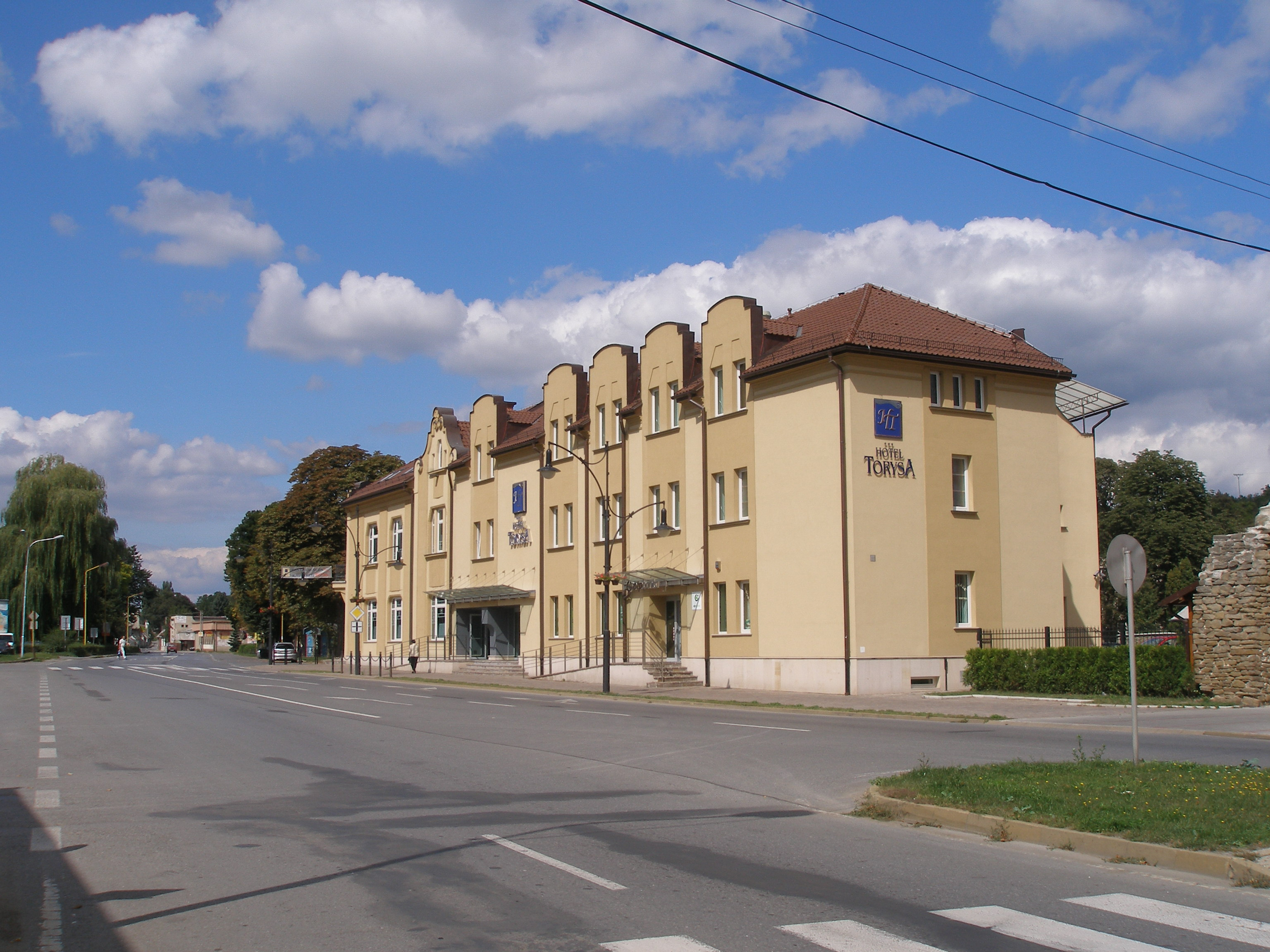 Sabinov starobylé bývalé slobodné kráľovské mesto na Slovensku. Dnes okresné mesto v regióne Šariš.